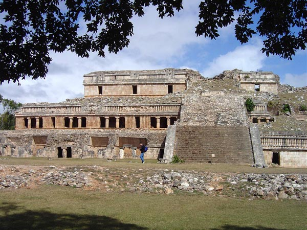 Sayil